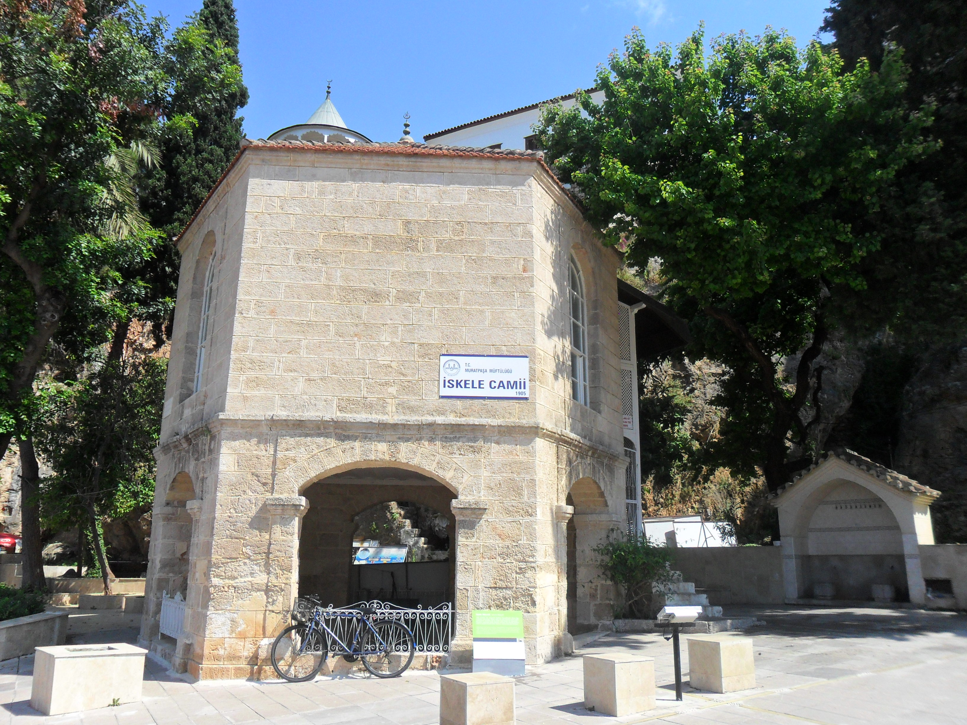 Antalya'nın marina bölgesinde yer alan İskele Camii.